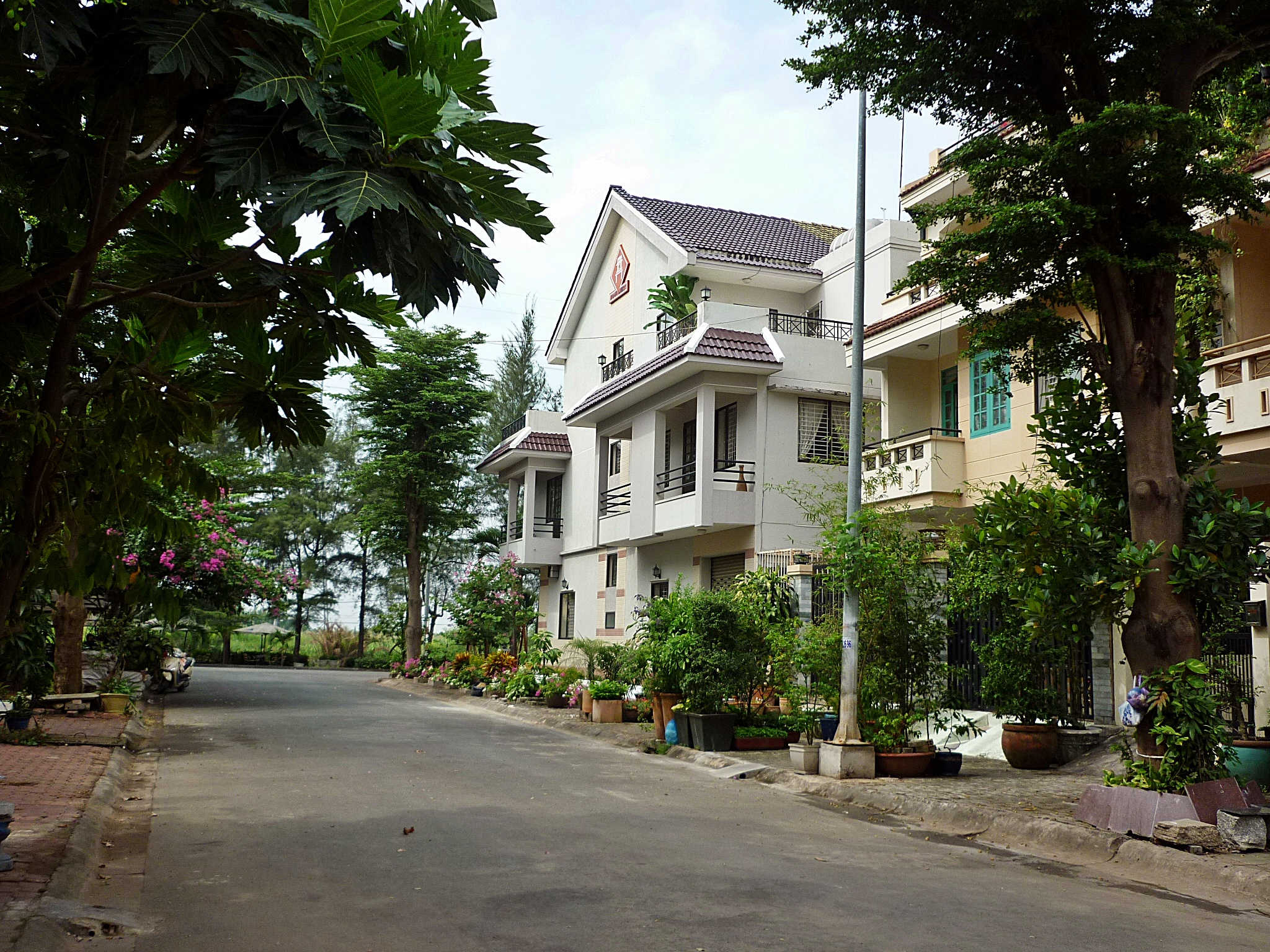 Một góc khu dân cư Nam Long tại phường Phước Long B quận 9 thành phố Hồ Chí Minh.